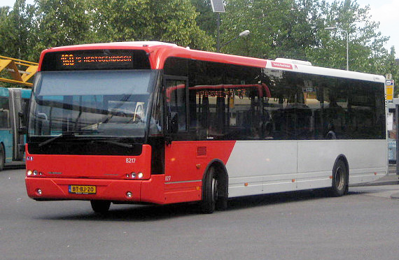 Arriva 8217 rijdt z'n perron op het busstation van Uden af.